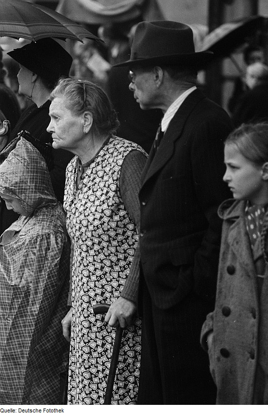 Original image description from the Deutsche FotothekZuschauer